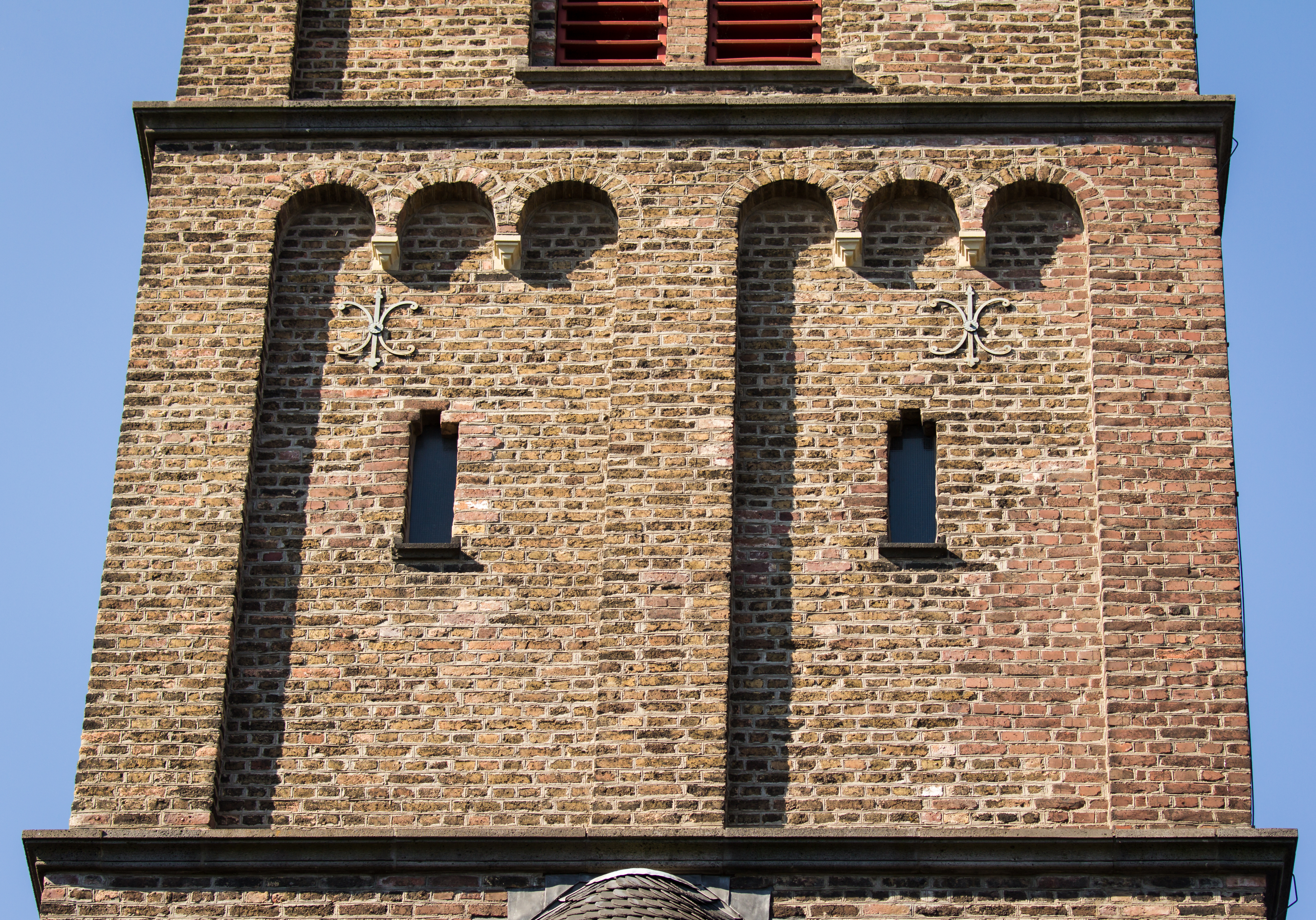 Katholische Pfarrkirche St. Servatius in Köln-Immendorf